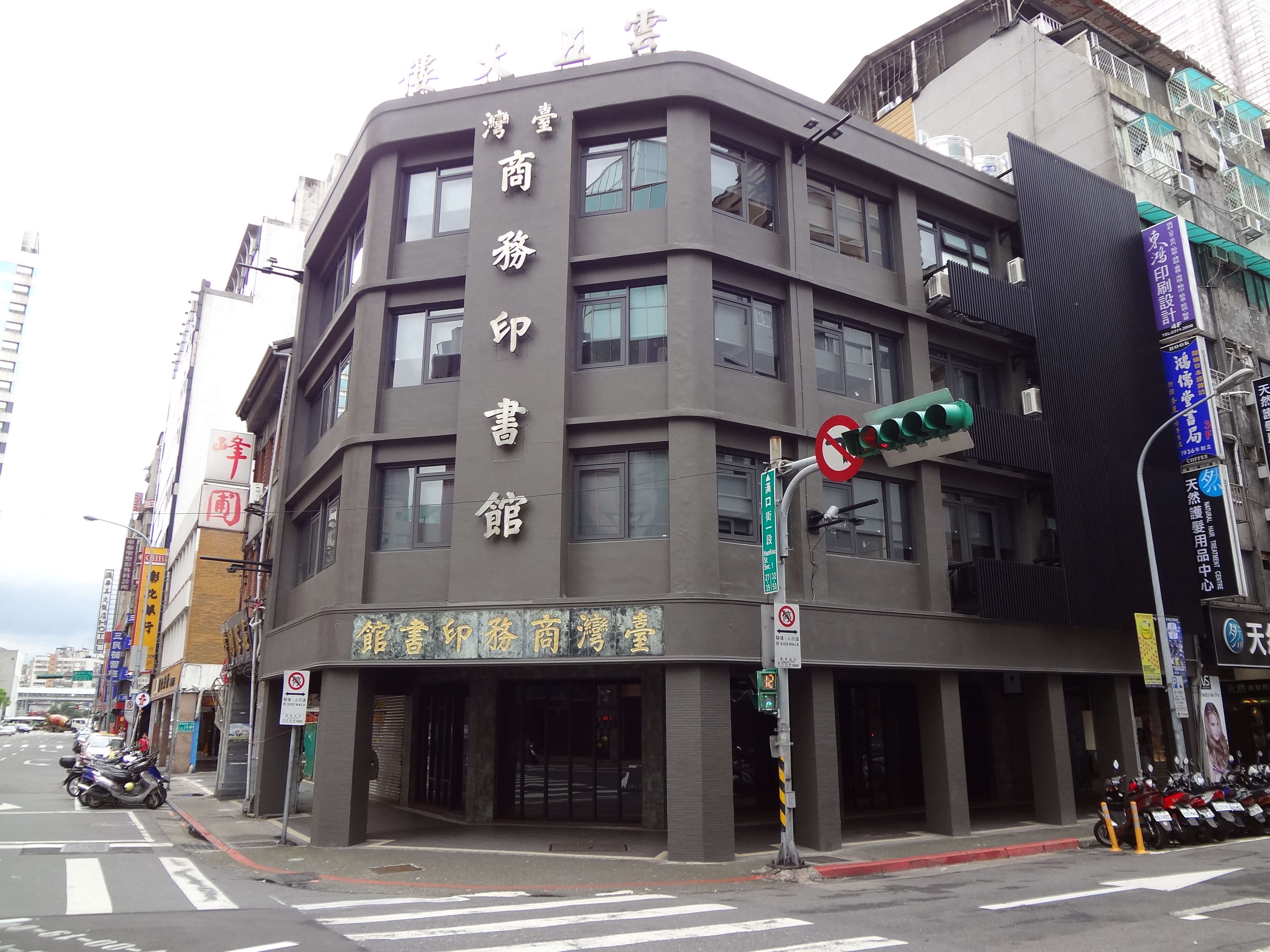 臺灣商務印書館雲五大樓。